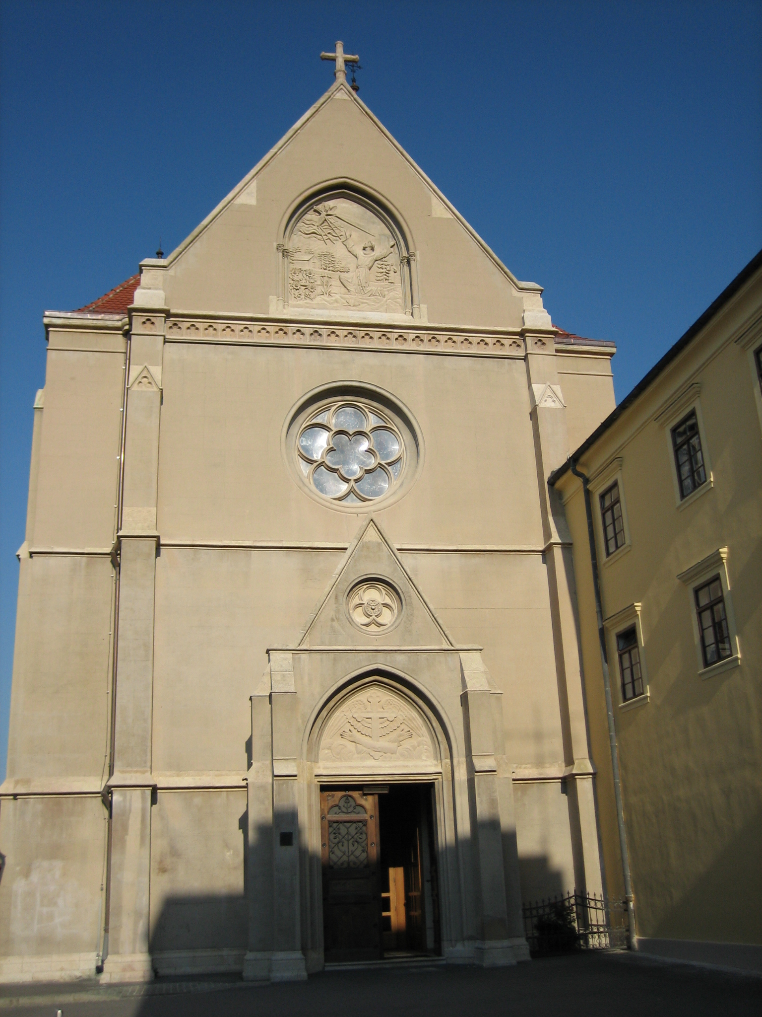 St. Francis Church of the franciscans in Zagreb, Croatia / Franjevačka crkva sv. Franje na Kaptolu u Zagrebu.